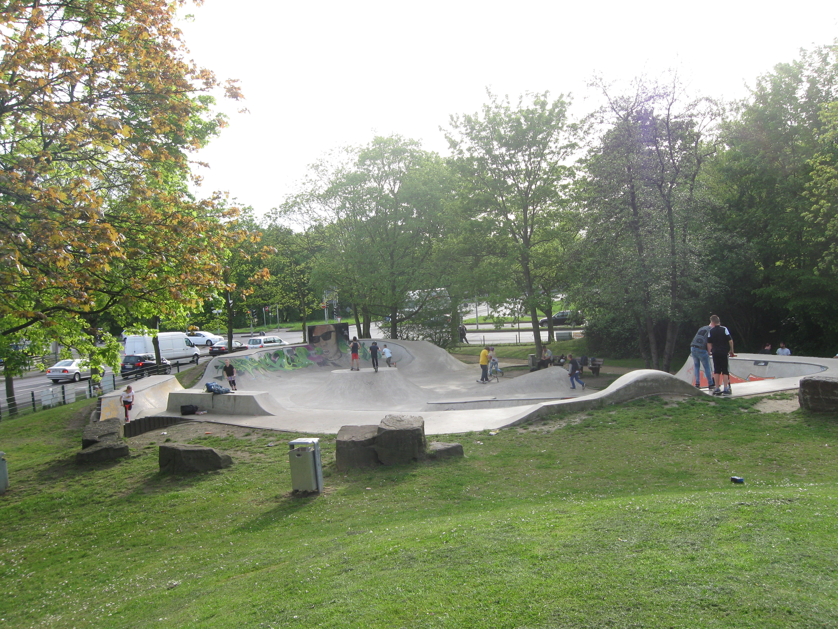 Skatepark Herne-Wanne (Hammerschmidtstraße)